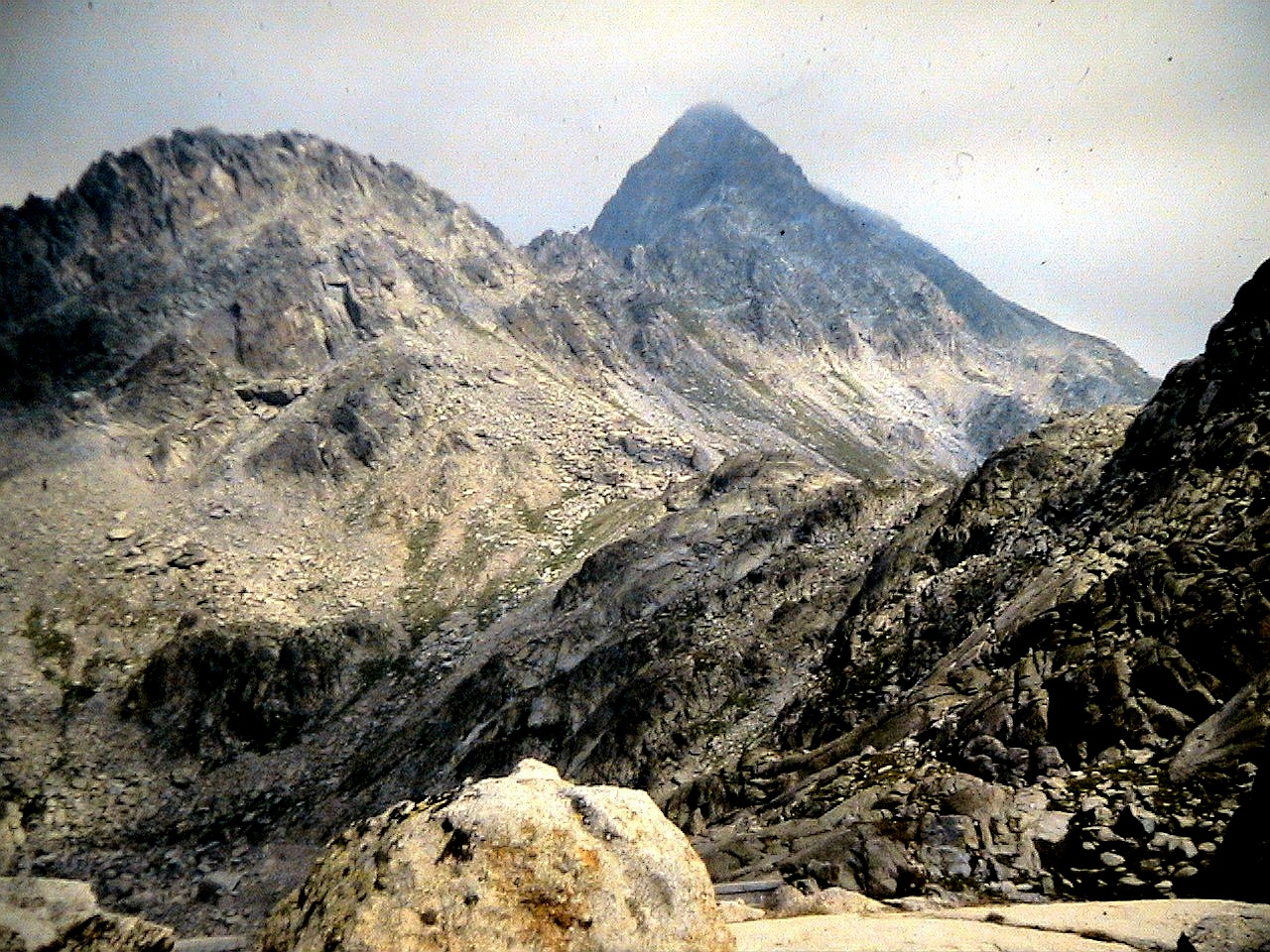 Pic de la Mainera des de la presa del llac de Saburó. Cabdella (Pallars Jussà - Catalunya). Foto presa de la projecció d'una diapositiva.